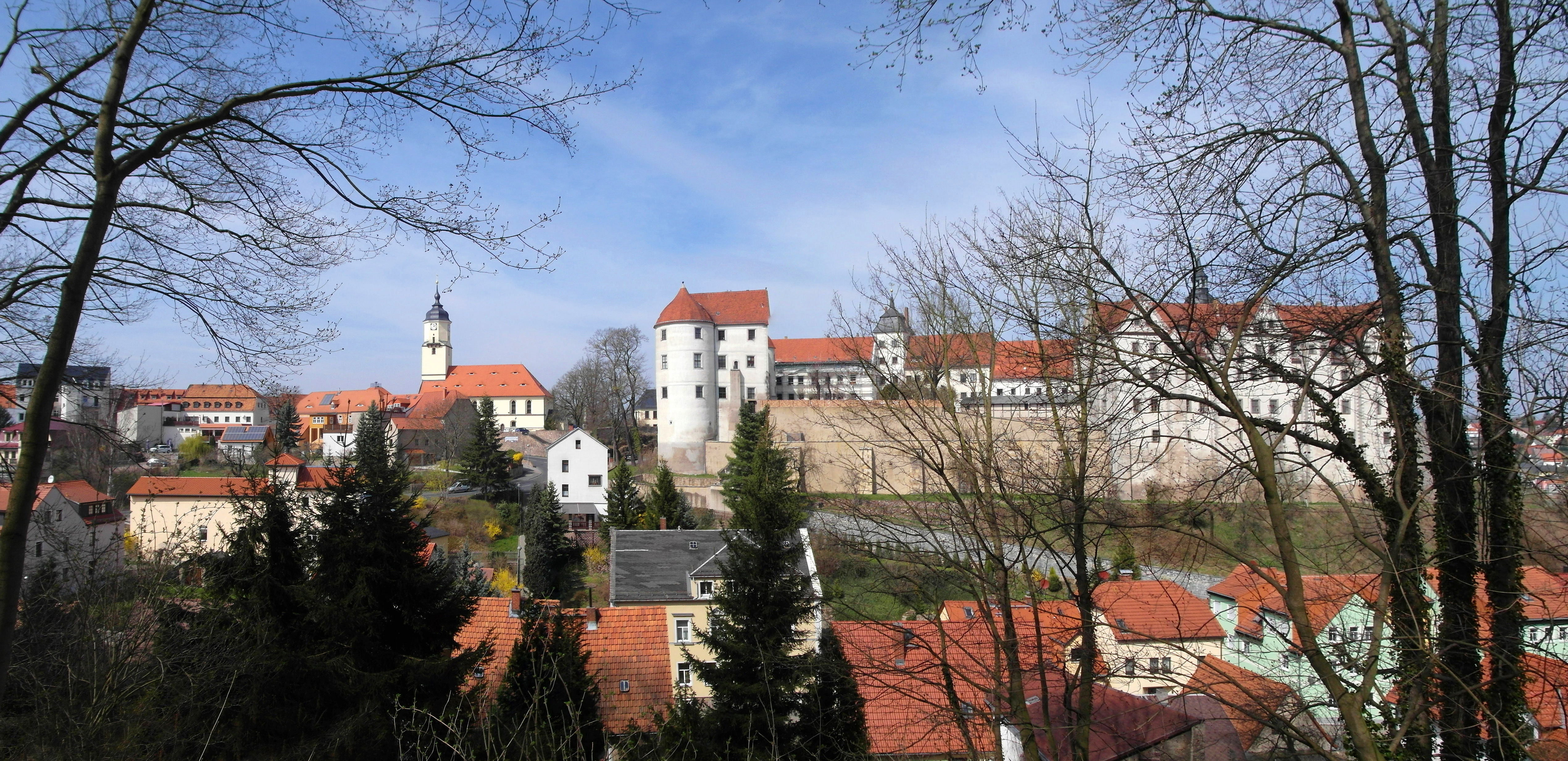 14.04.2015 01683 Nossen: Blick vom Rodigt Berg aus Südosten zu Kirche und Schloß [SAM9810+9813JPG]20150414700MDR.JPG(c)Blobelt